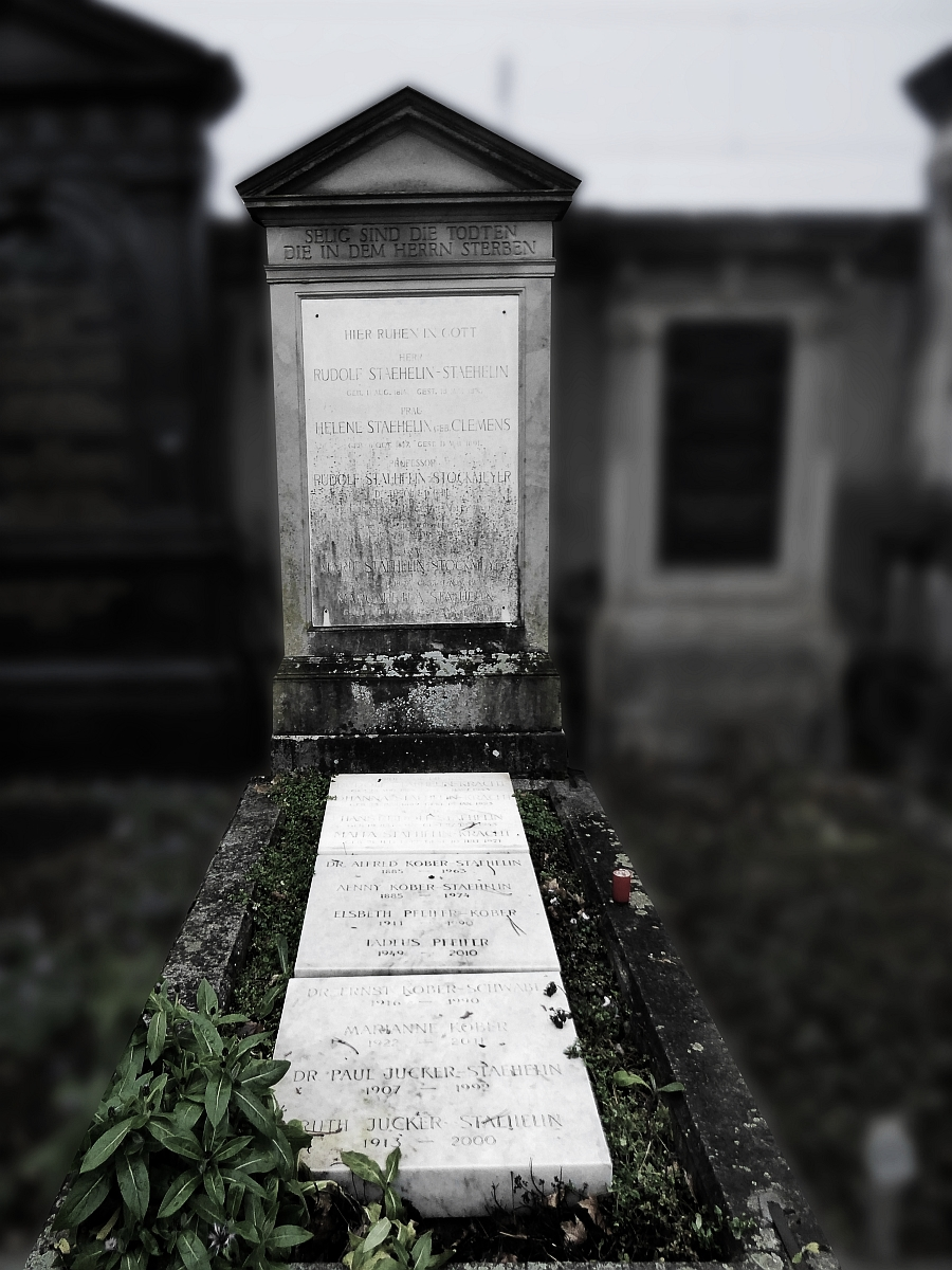 Familengrab auf dem Friedhof Wolfgottesacker, Basel